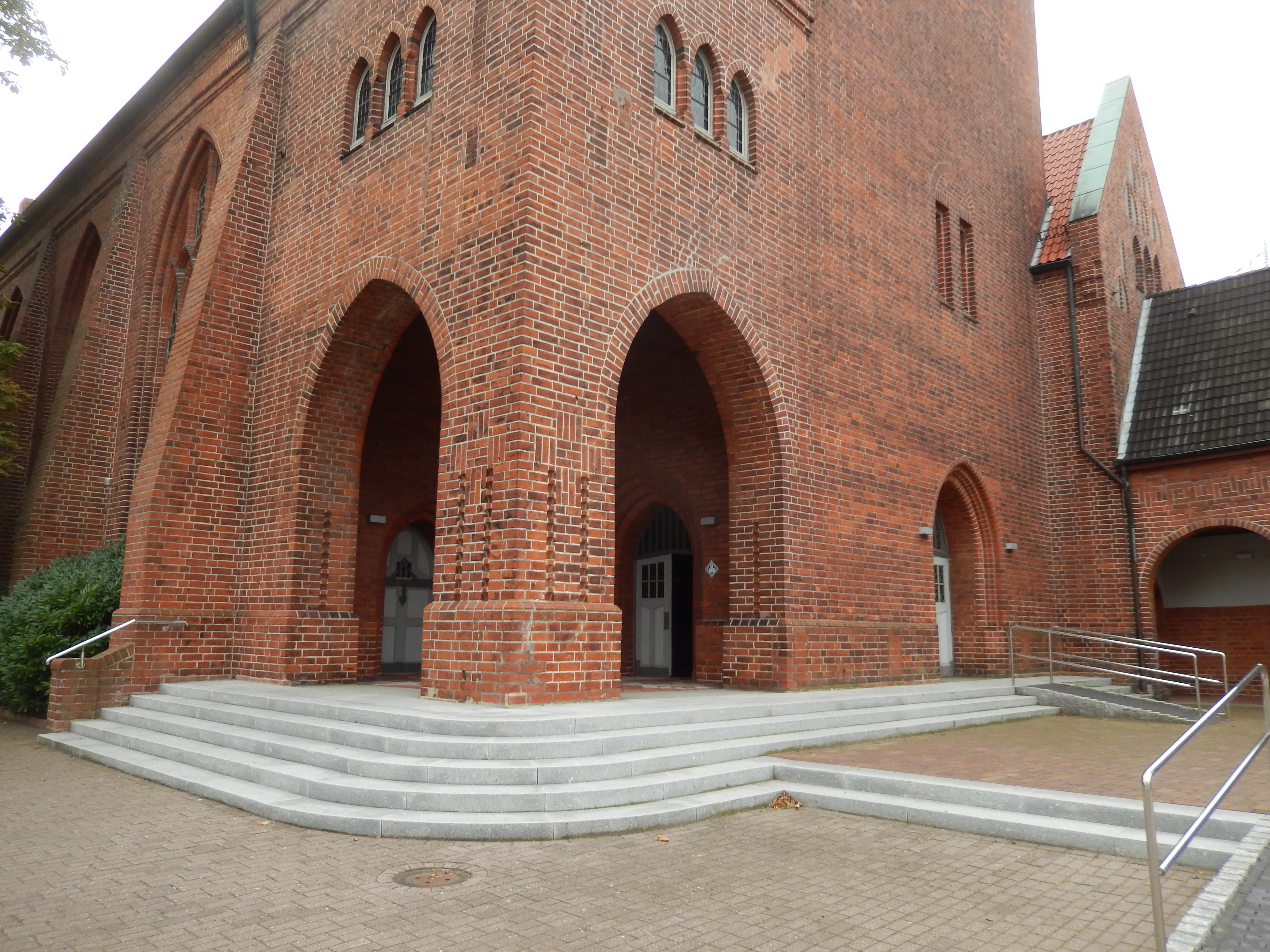 Eingang Sankt Petri Kirche Cuxhaven